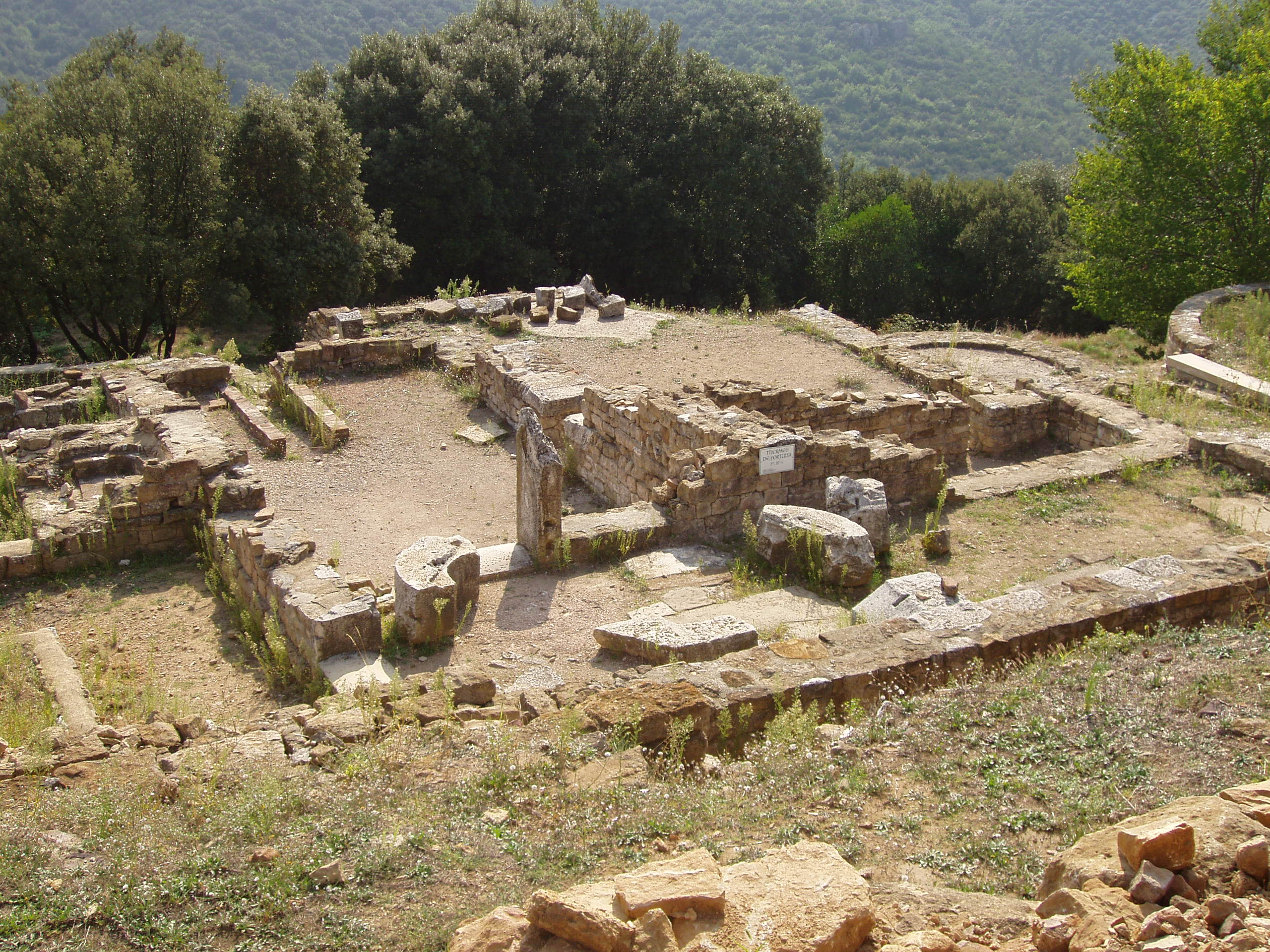 Oppidum de Gaujac (Gard) : les thermes